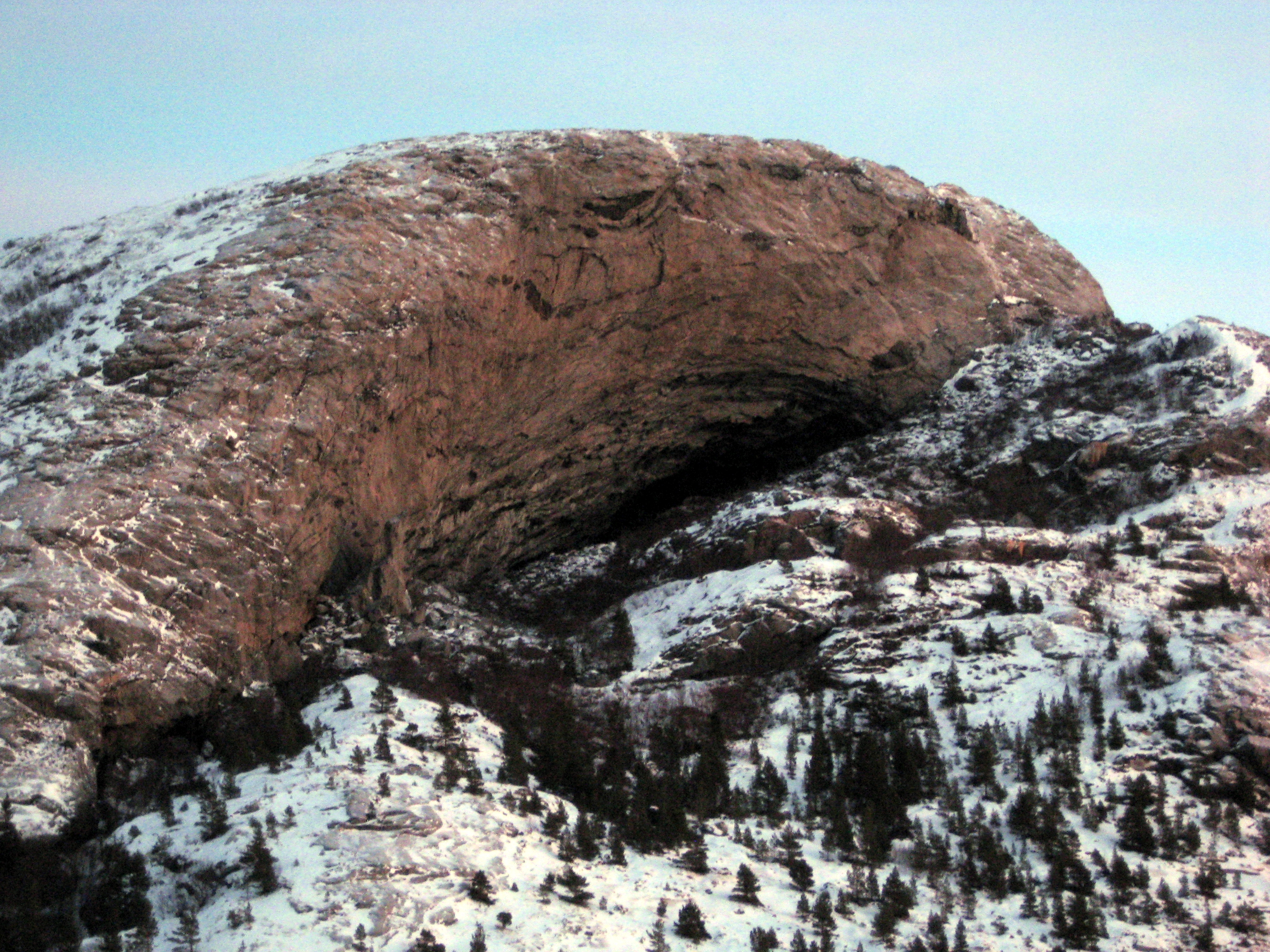 Hanshelleren